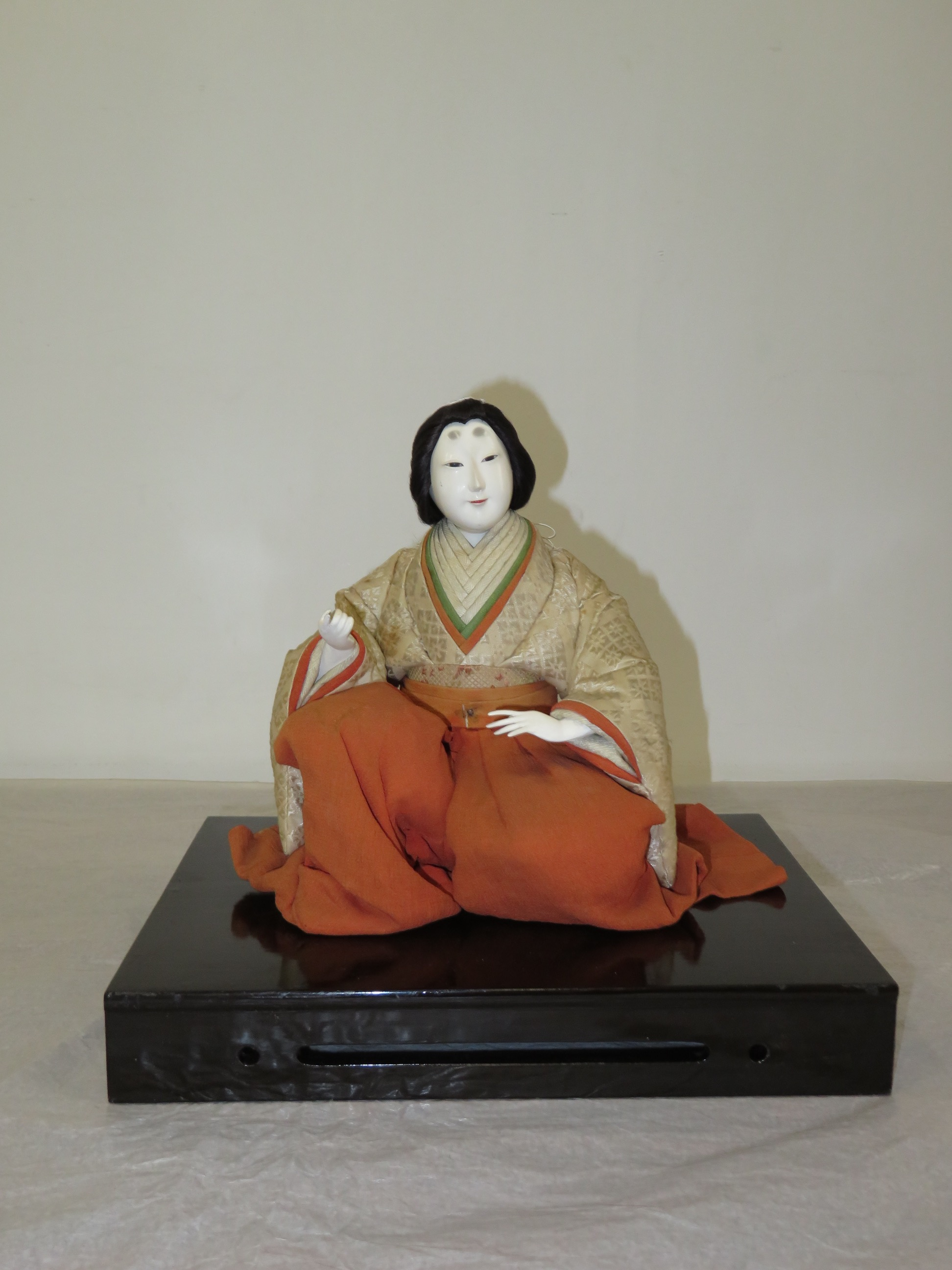 2018年2月27日-3月18日 東京国立博物館展示風景